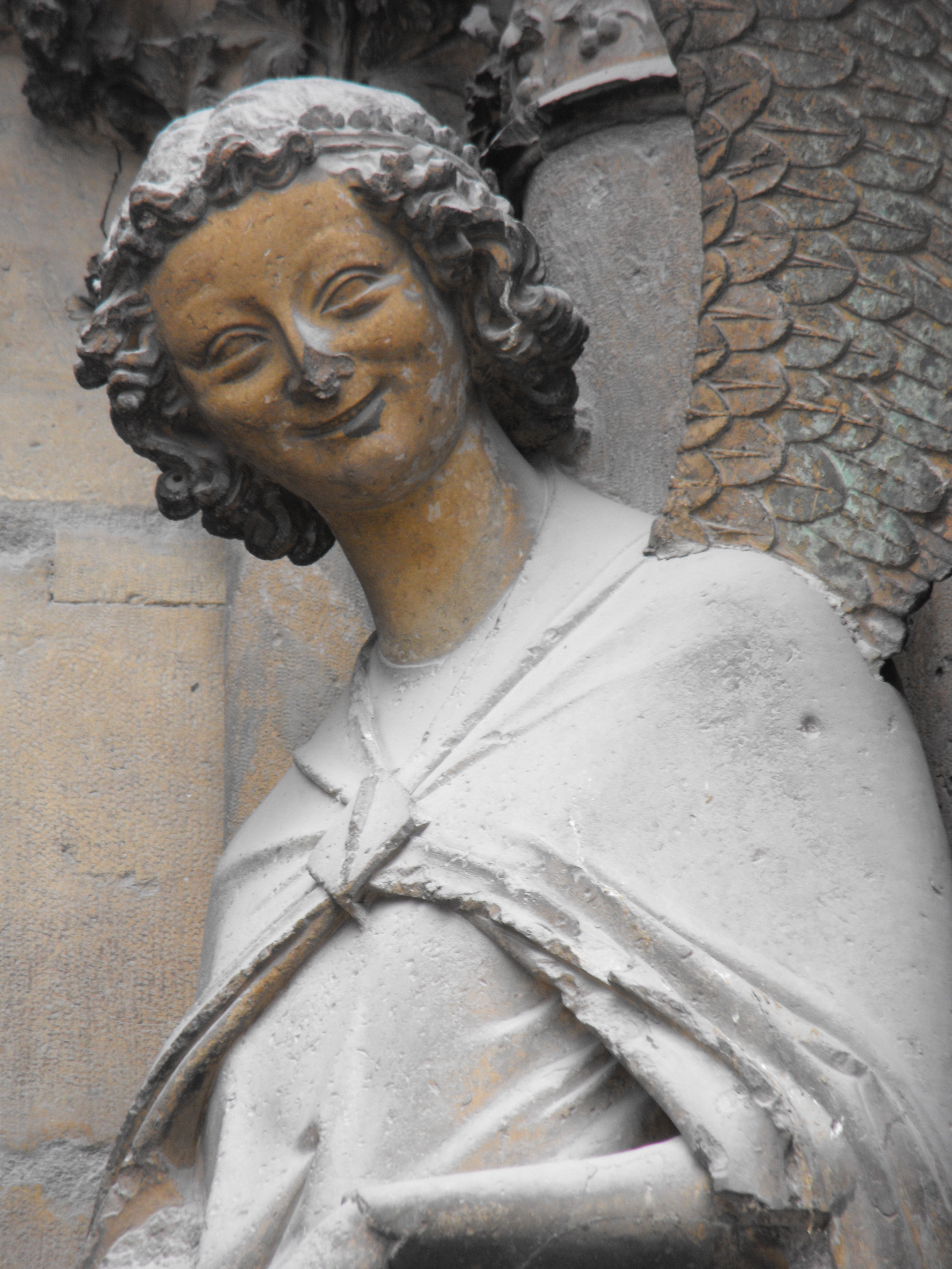 détails - "Le sourire de Reims"